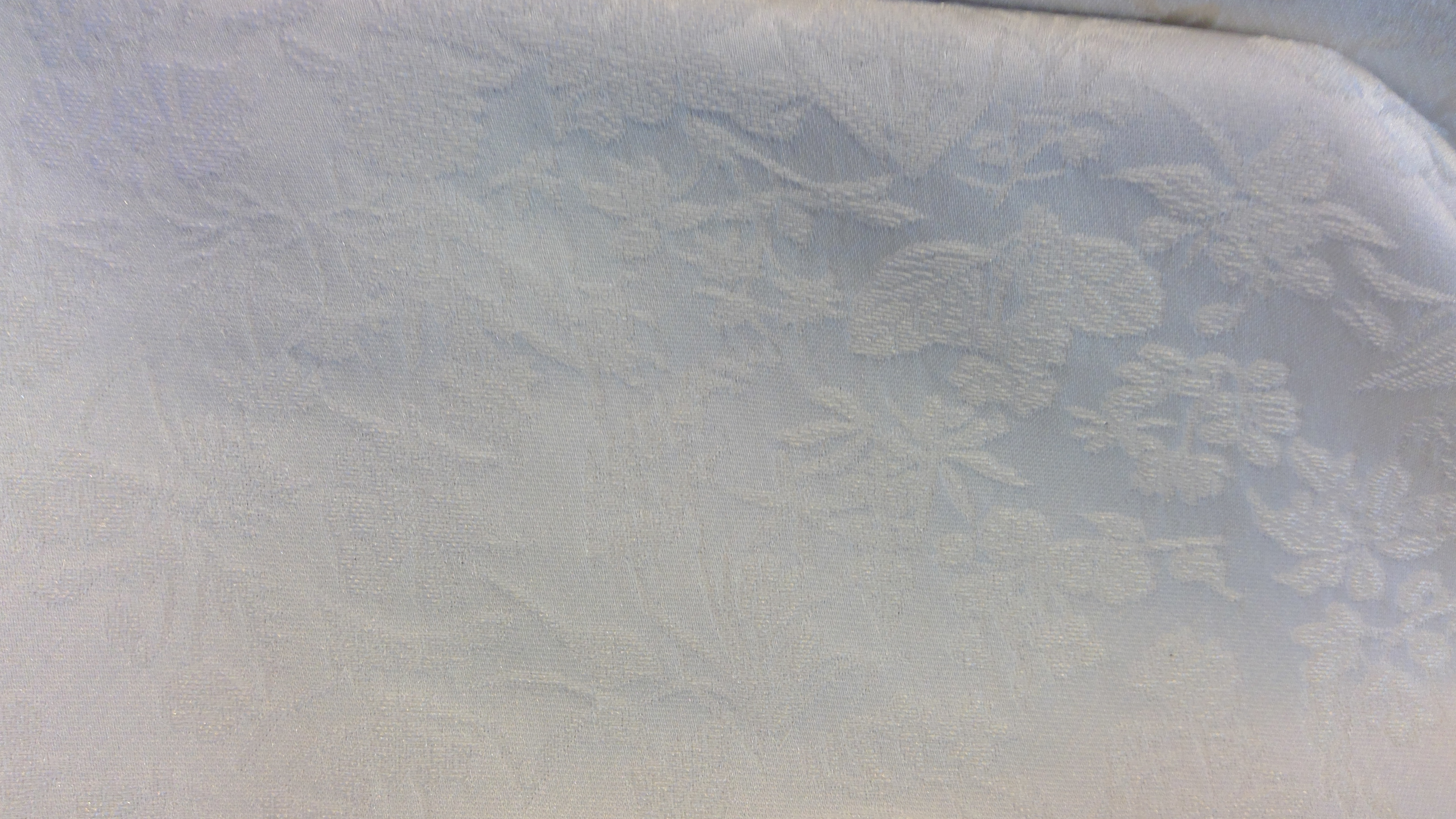 丹後ちりめんの後染め織物の布地